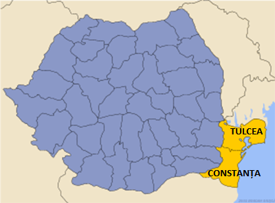 Tulcea si Constanta